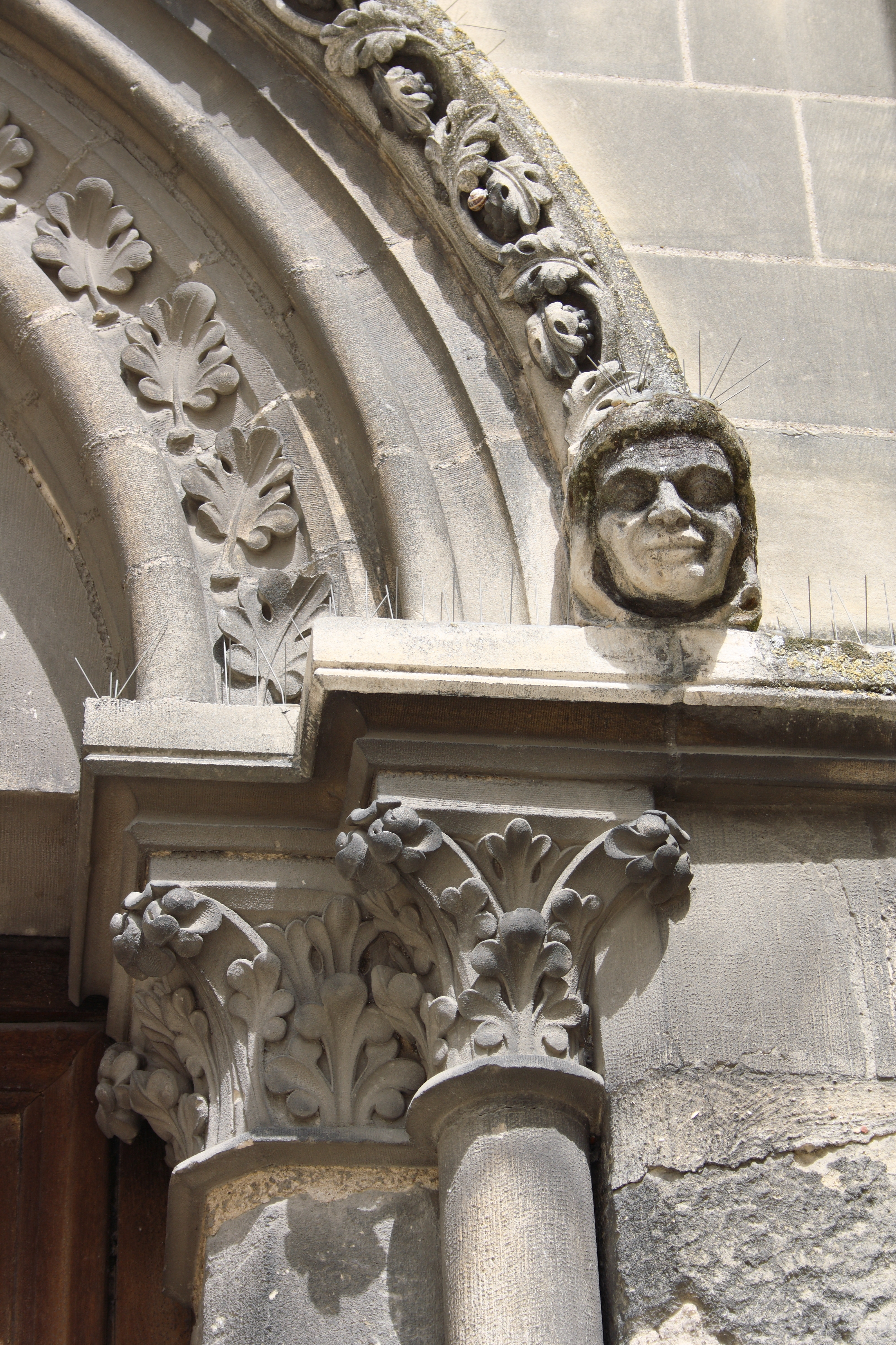 katholische Pfarrkirche Saint-Pierre-Saint-Paul in Gonesse